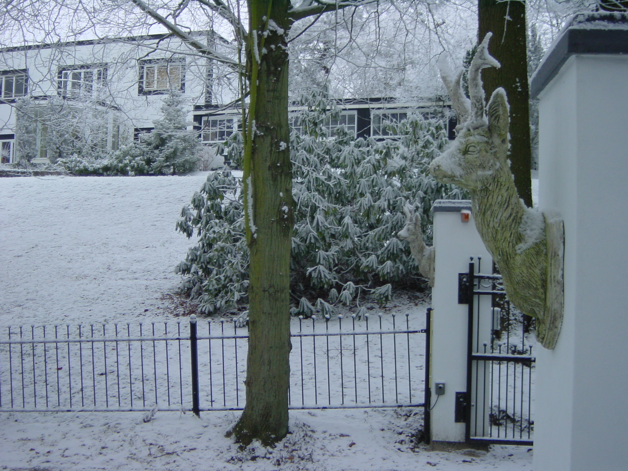 De Witte Hoogt winter